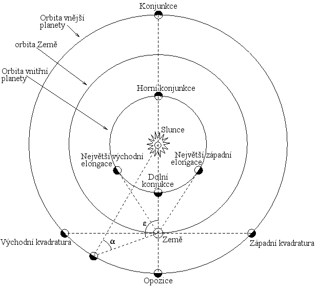 Obrázek pro poziční astronomii, který vytvořil wikipedista Looxix, do češtiny přeložil Beren.